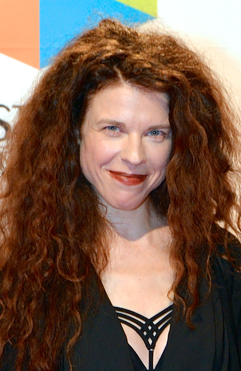 Jessika Gedin på Kristallen-galan den 30 augusti 2013.